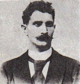 Ignacy Daszyński (1866-1936).